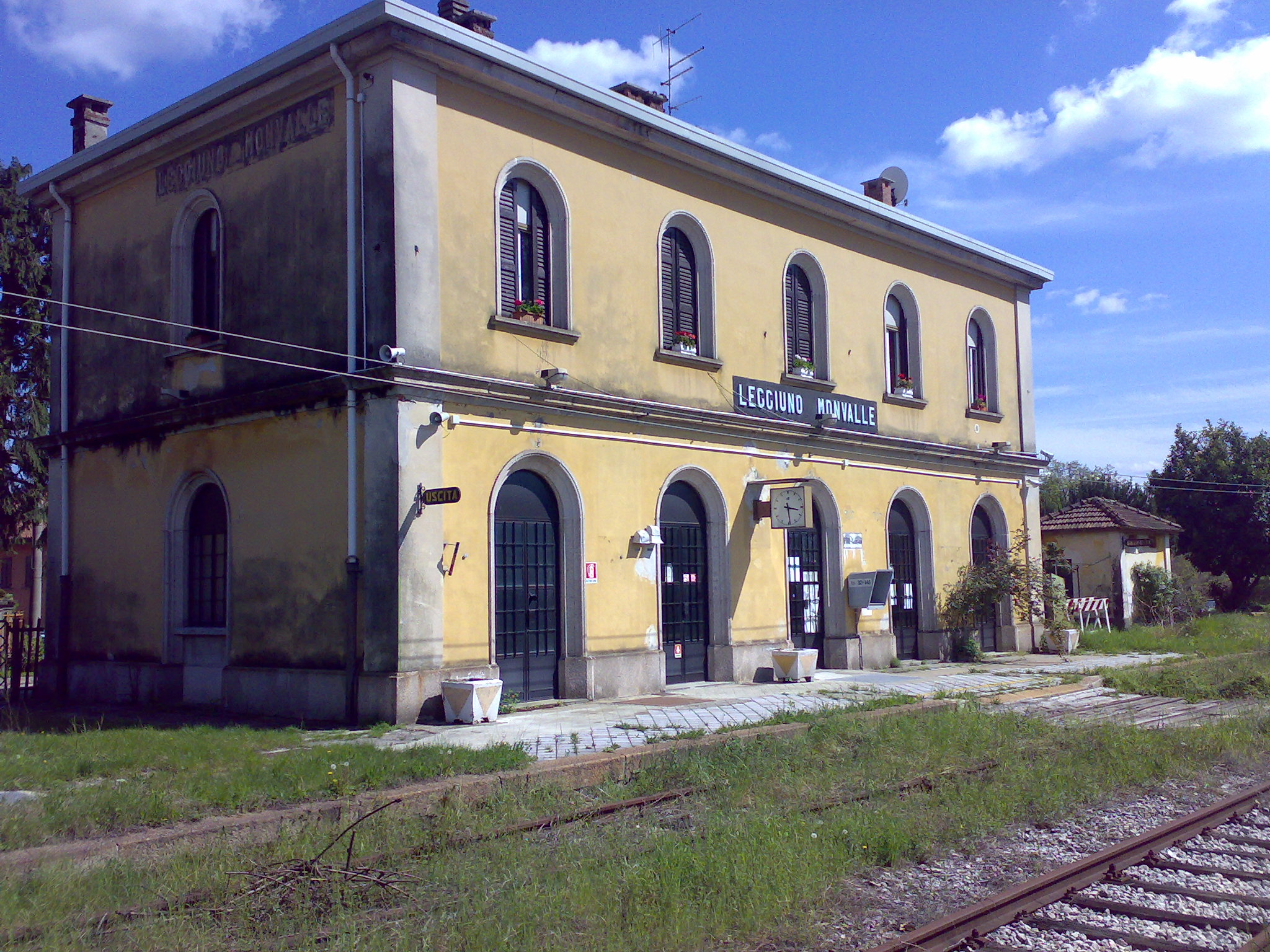 Lato binari della stazione di Leggiuno-Monvalle